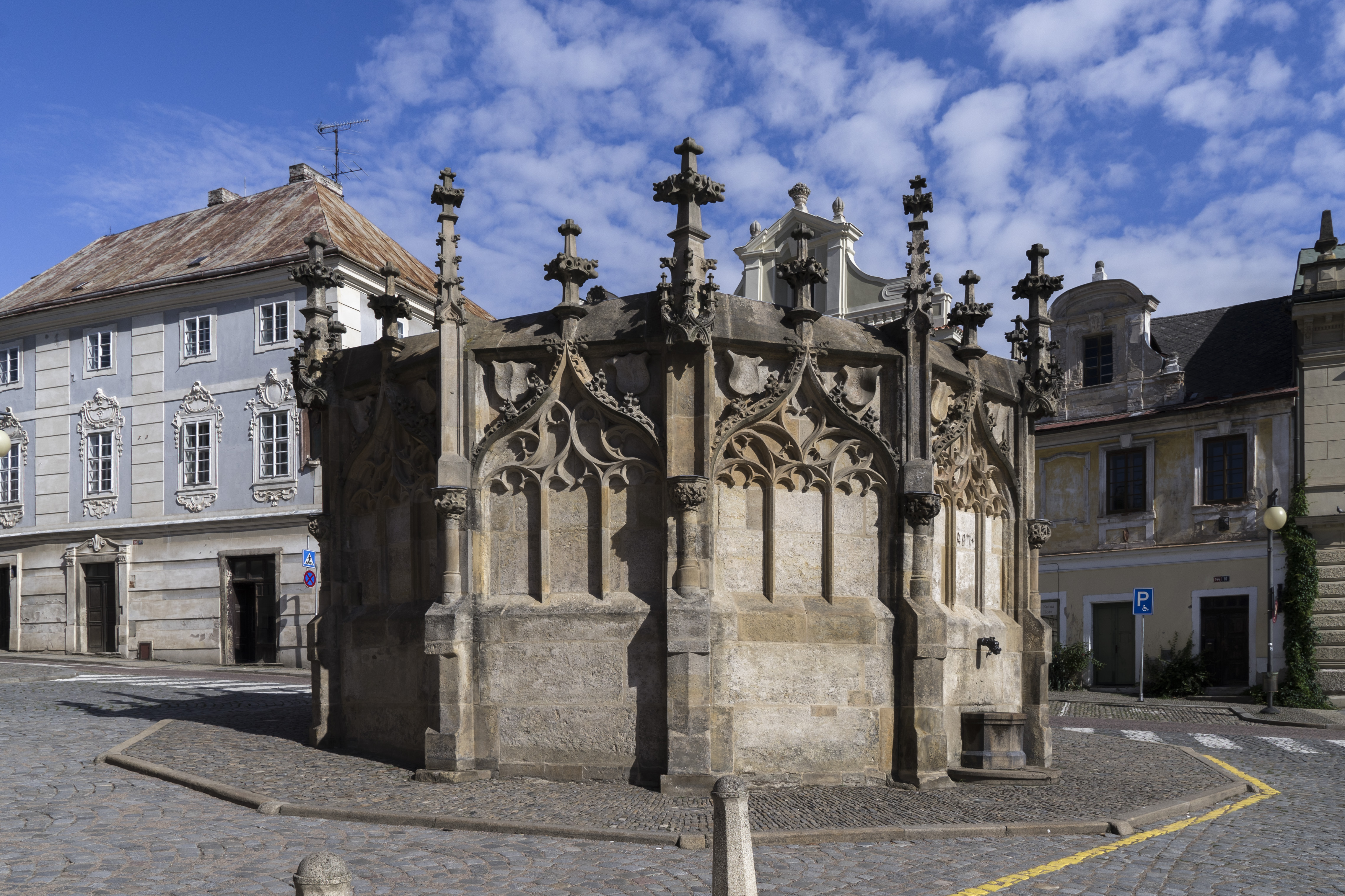 Stone fountain, Kutna Hora